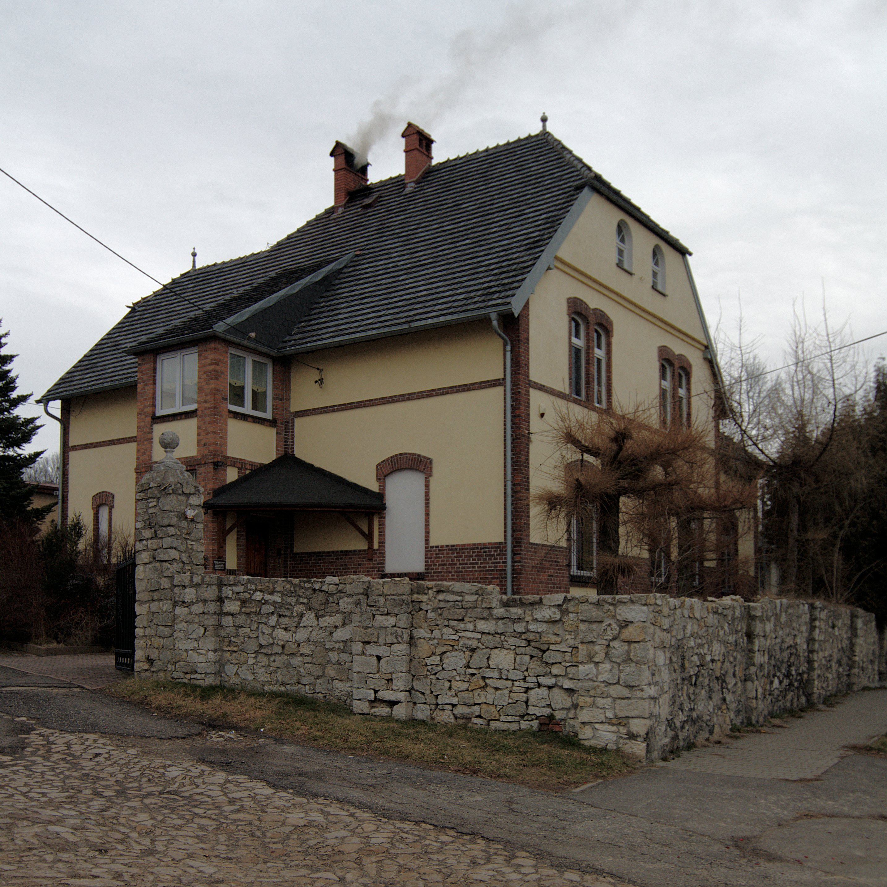 Zbrosławice. Plebania.